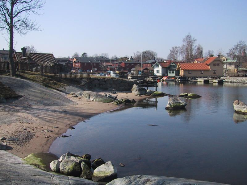 Vaxholm, 2002-04-10 / hemgjord / GNU